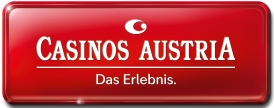 Logo Casinos Austria AG